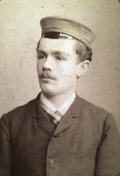 Porträtfotografie von Victor Niemeyer